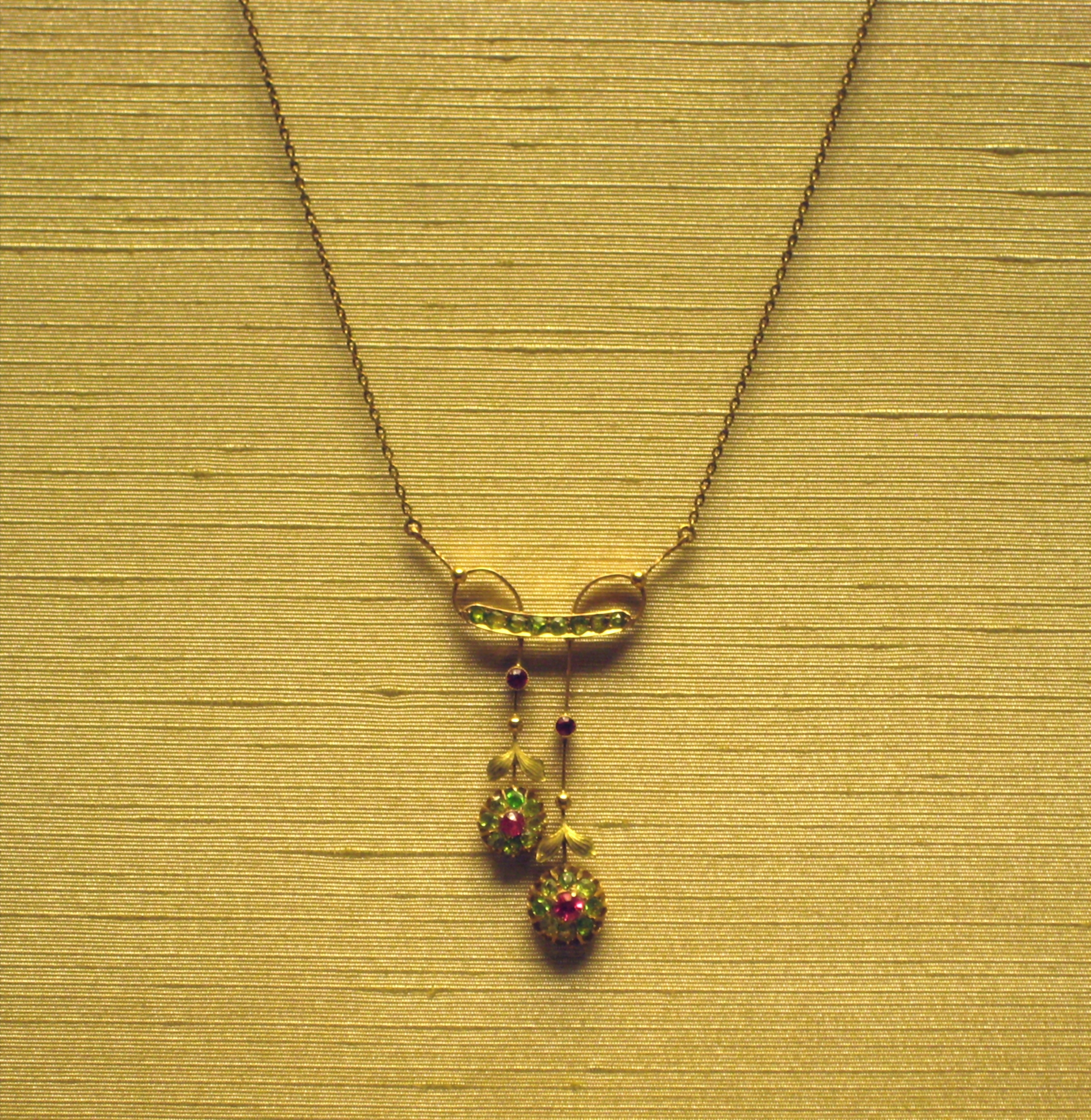 1. Кулон. Москва, 1908-17. Мастер-монограммист ИГ. Демантоиды, золото. Музей истории камнерезного...